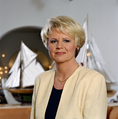 Elleke van Doorn